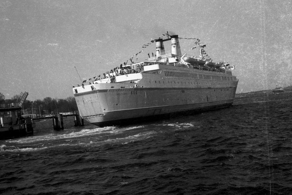 Die Fähre hat die Kreuzfahrt Lübeck-Århus-Kiel beendet.